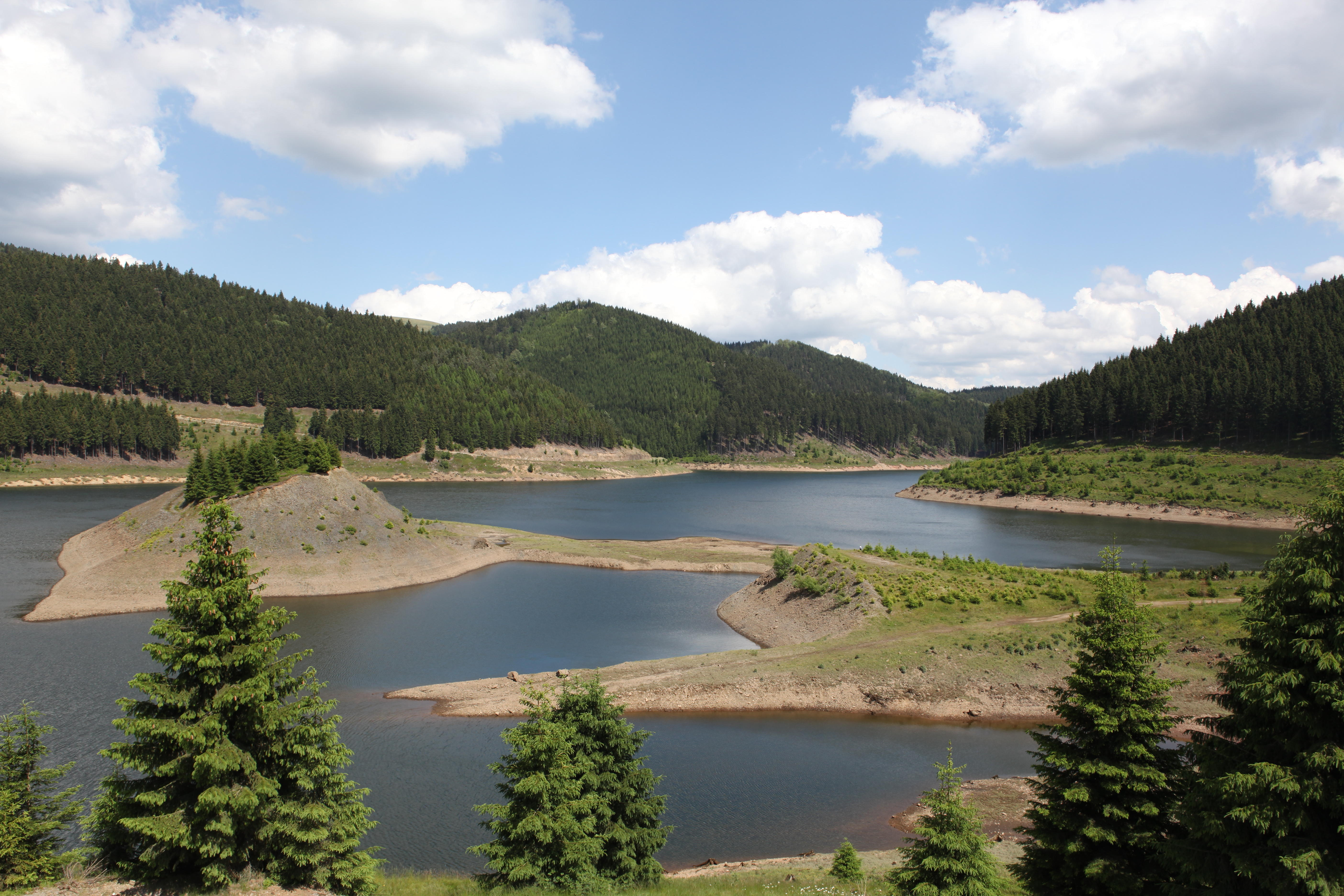 Stausee Oberes Schwarzatal (Unterbecken vom PSW Goldisthal), im Vordergrund Vogelinsel